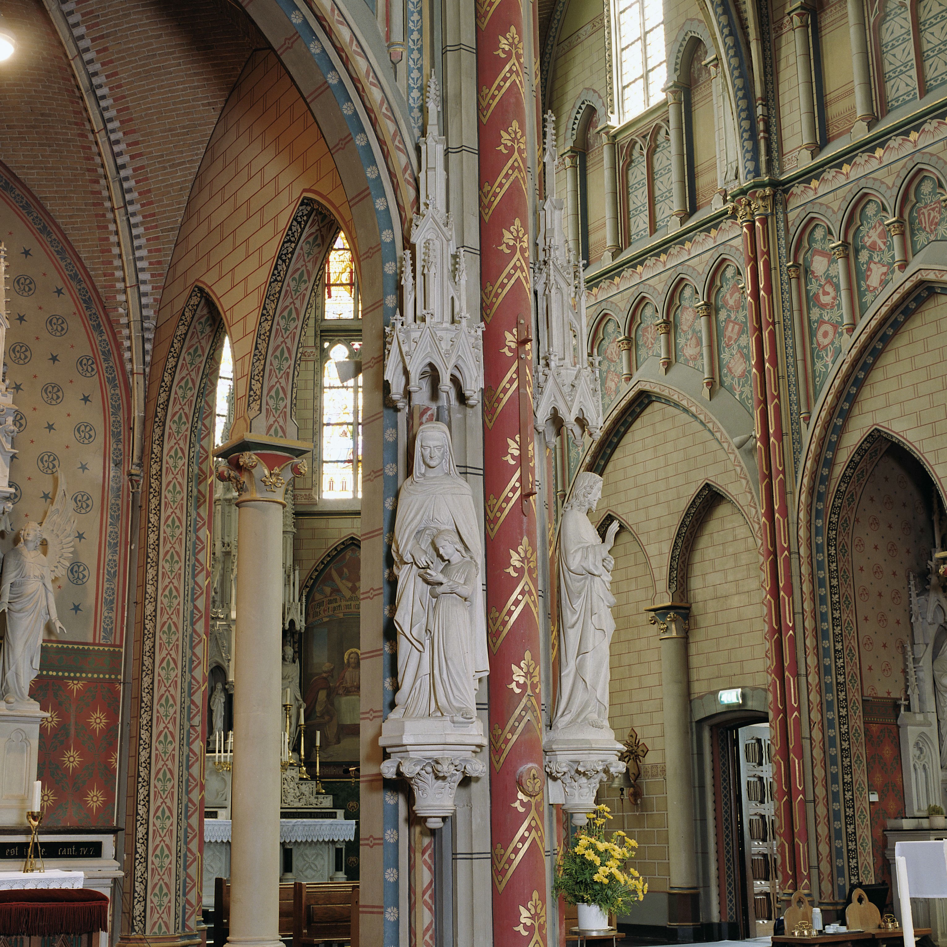 R.K. Kerk: Interieur, beeld H. Anna met Maria